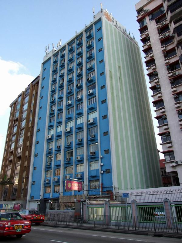 明愛賓館